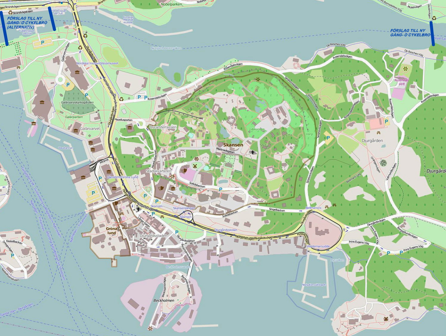 Området för "Evenemangsparken Södra Djurgården" på Open Street map